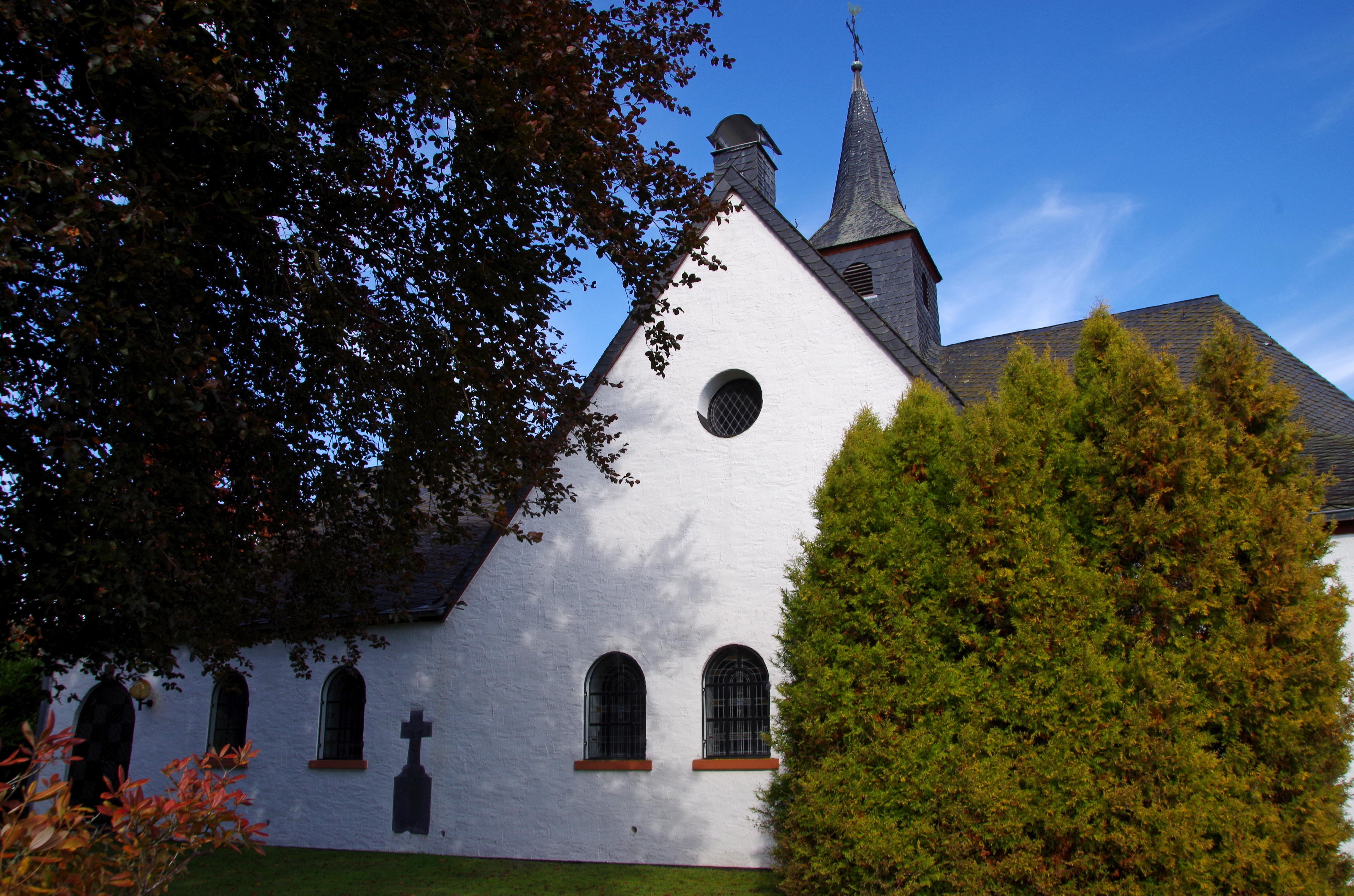 St. Ägidius (Wolfert), Südseite